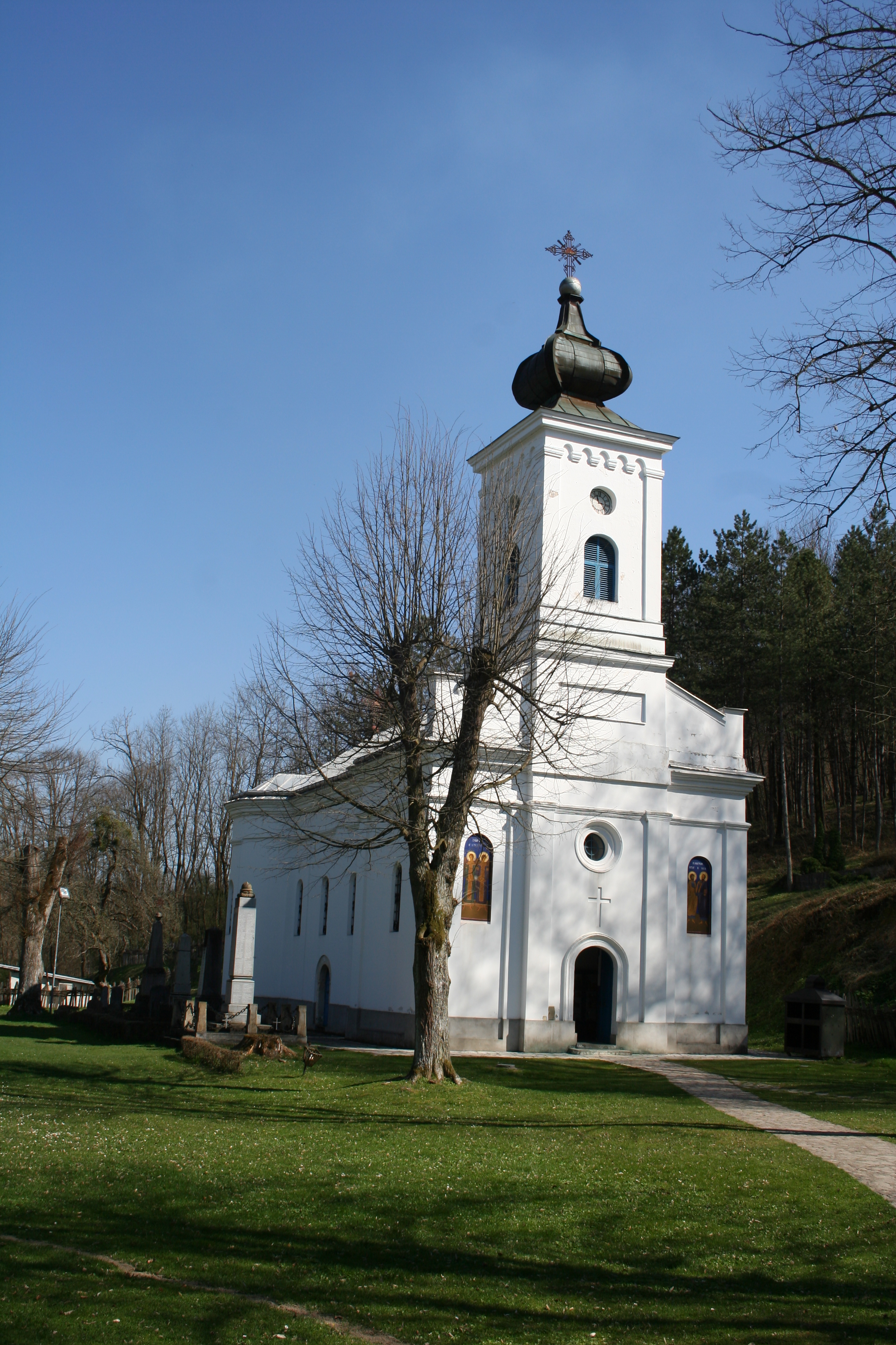 Crkva u Brankovini